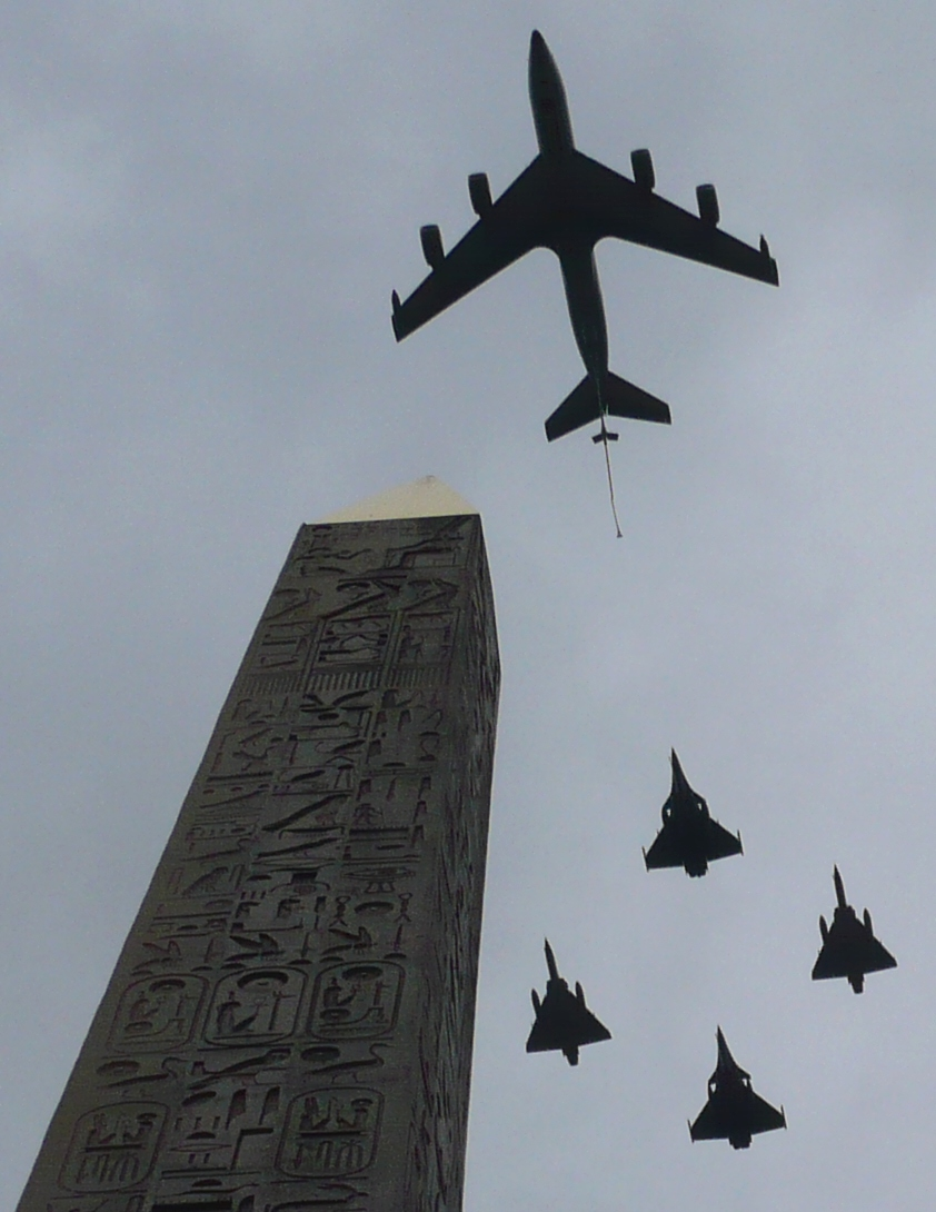 Avions militaires en formation. Place de la Concorde, Paris (France).